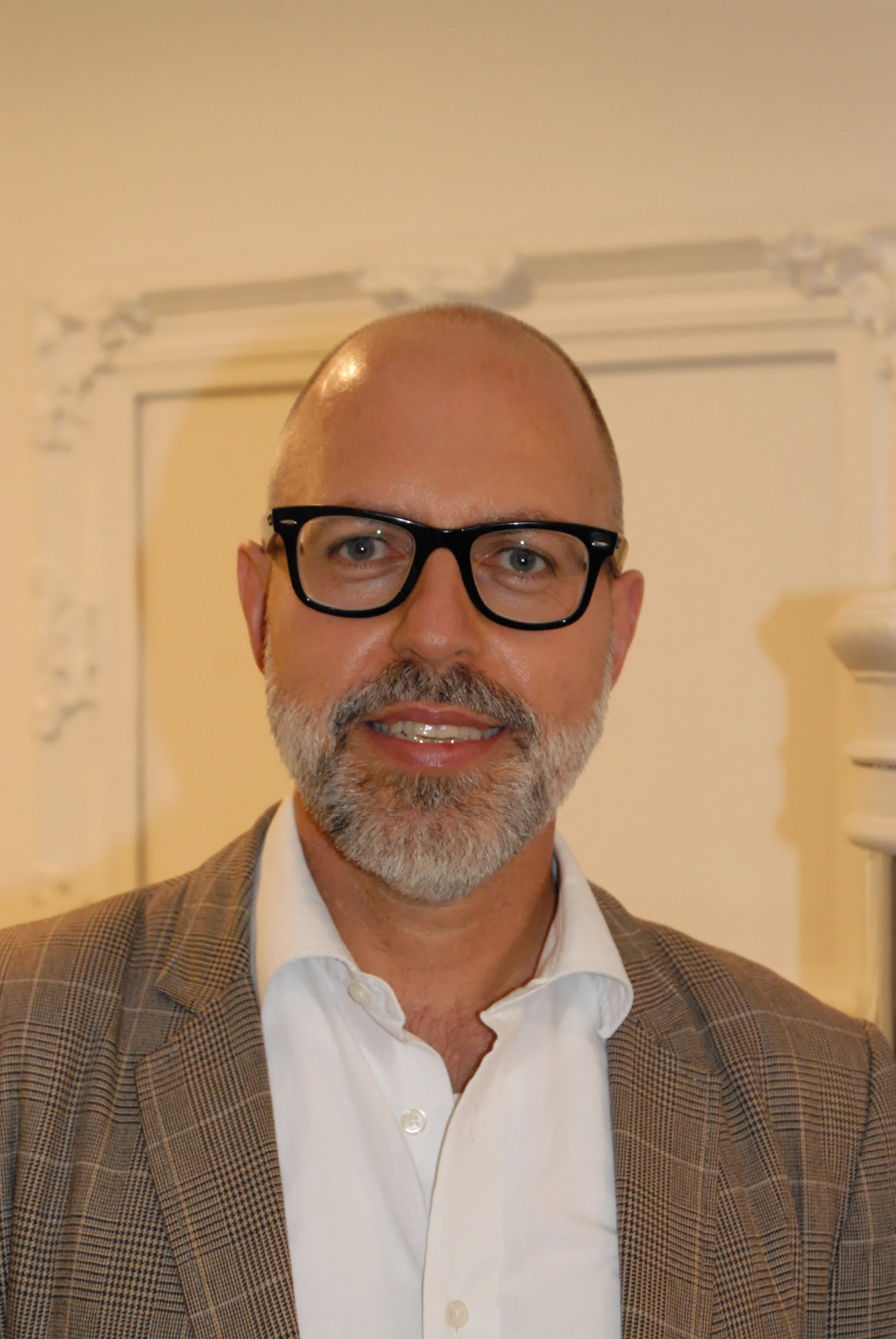 Frank Schablewski bei Lesung „Fremde, Nachbarn, Freunde“ in Düsseldorf